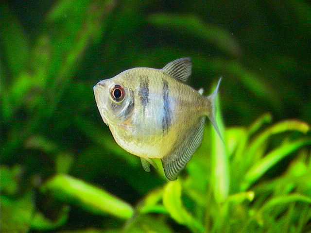 veuve noire femelle